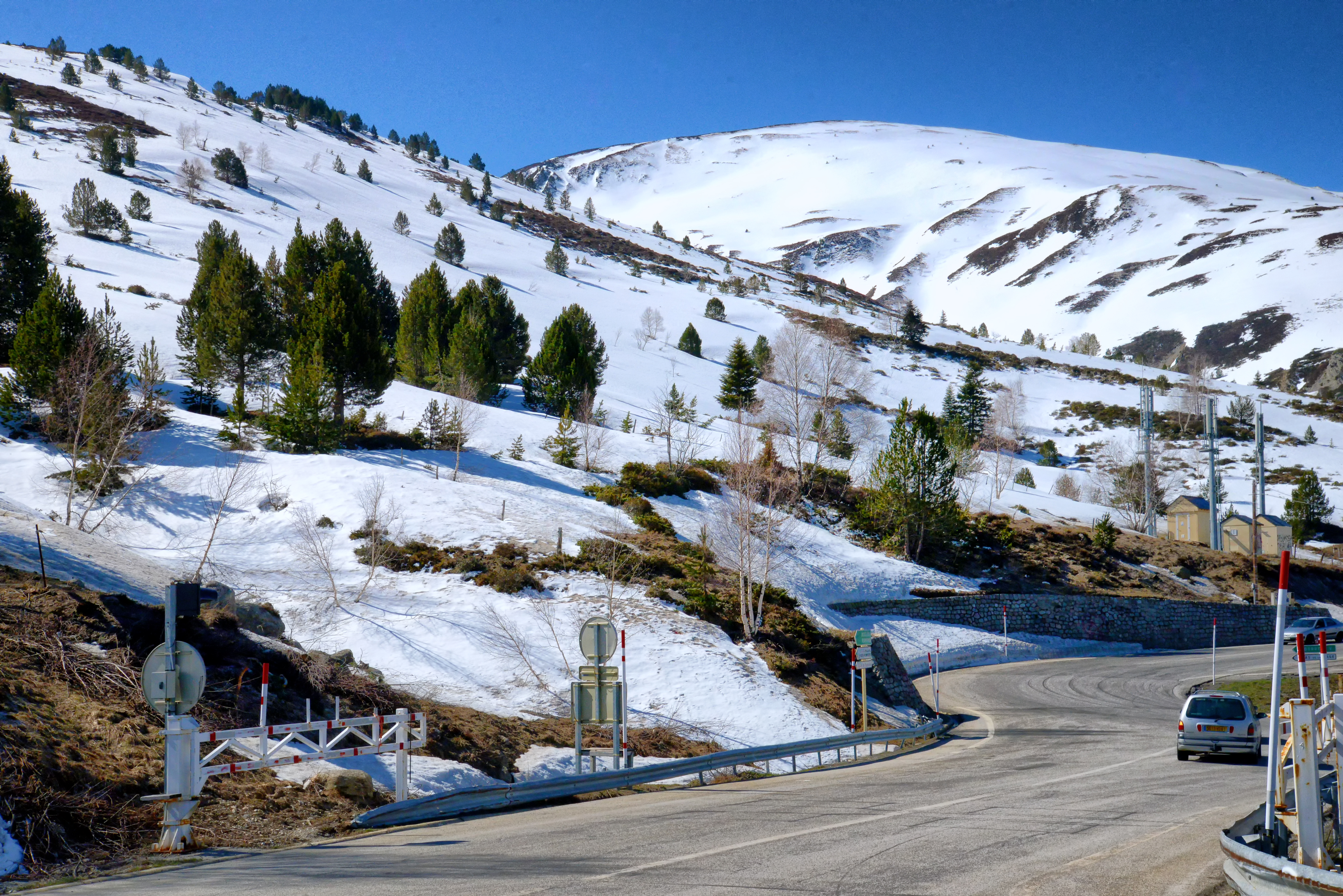 Portée-Puymorens, Ariège (Midi-Pyrénées) - Jonction des routes N22 et N320 (altitude 1773 m), la RN22 menant au Pas de la Casa (Andorre)